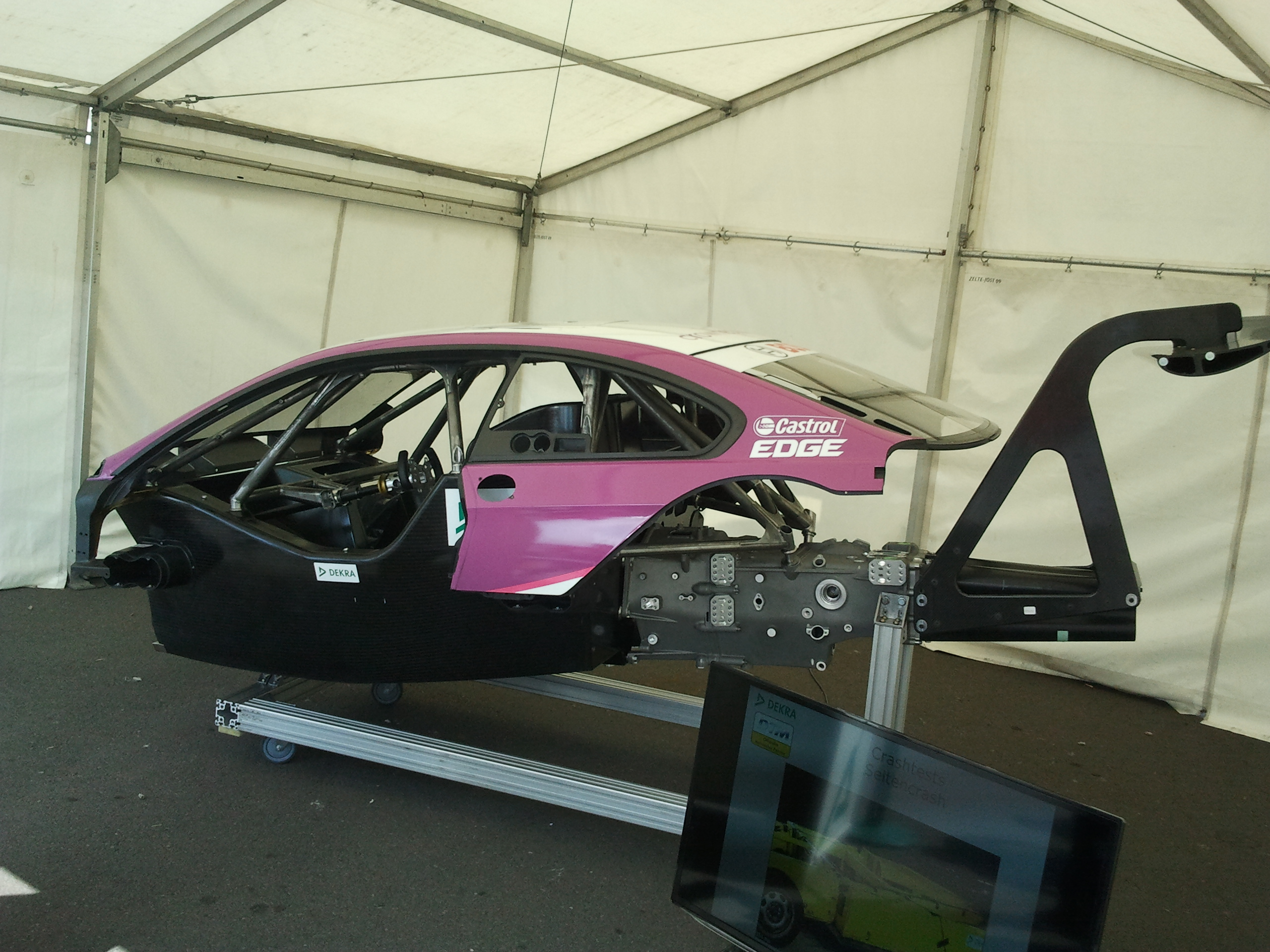 DTM Chassi